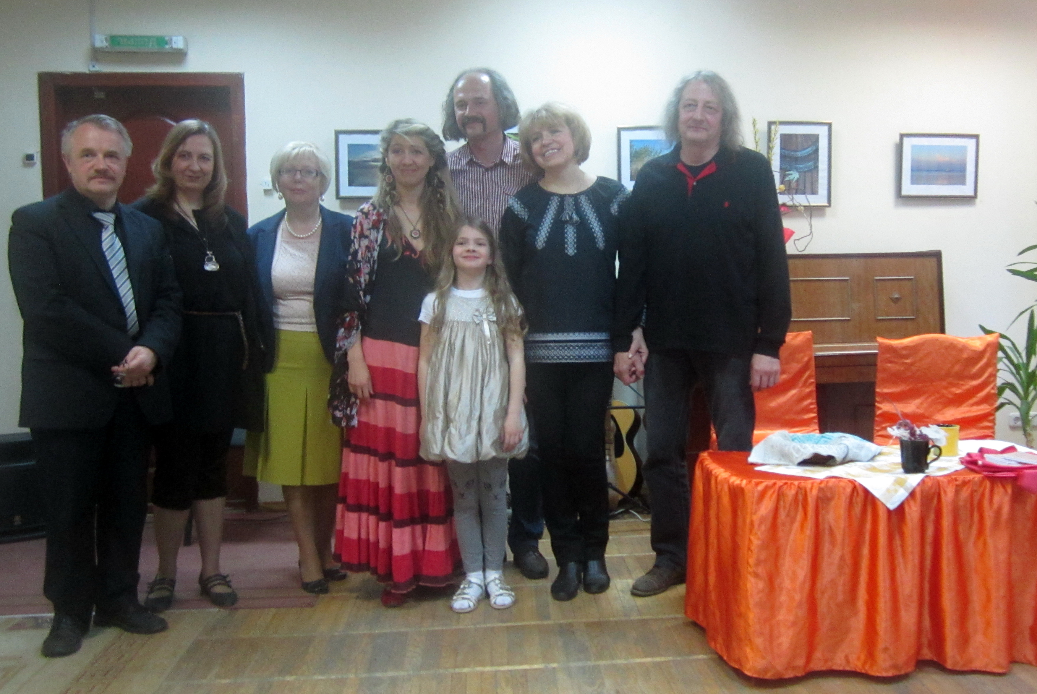 Удзельнікі паэтычнага тэатра Аксаны Спрынчан «Арт. С». Злева-направа: Віктар Шніп, Людміла Рублеўская, Рэгіна Багамолава, Аксана Спрынчан з дачкой Альжбэтай, Яраш Малішэўскі, Ірына Клімковіч, Максім Клімковіч